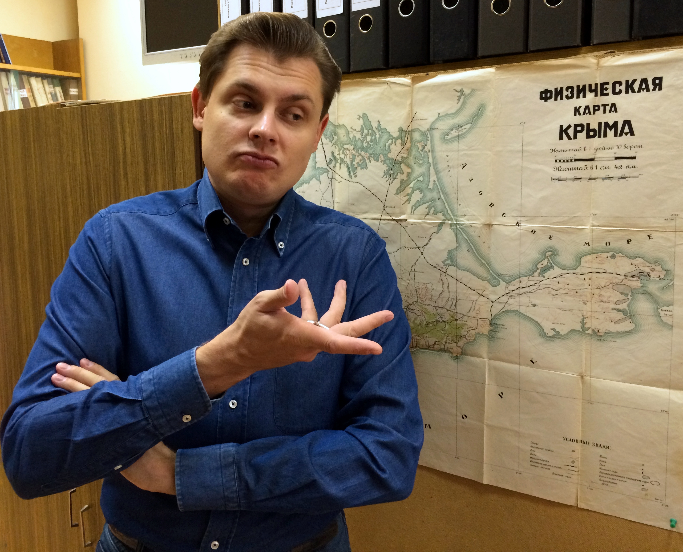 Е. Н. Понасенков в Российской академии наук.